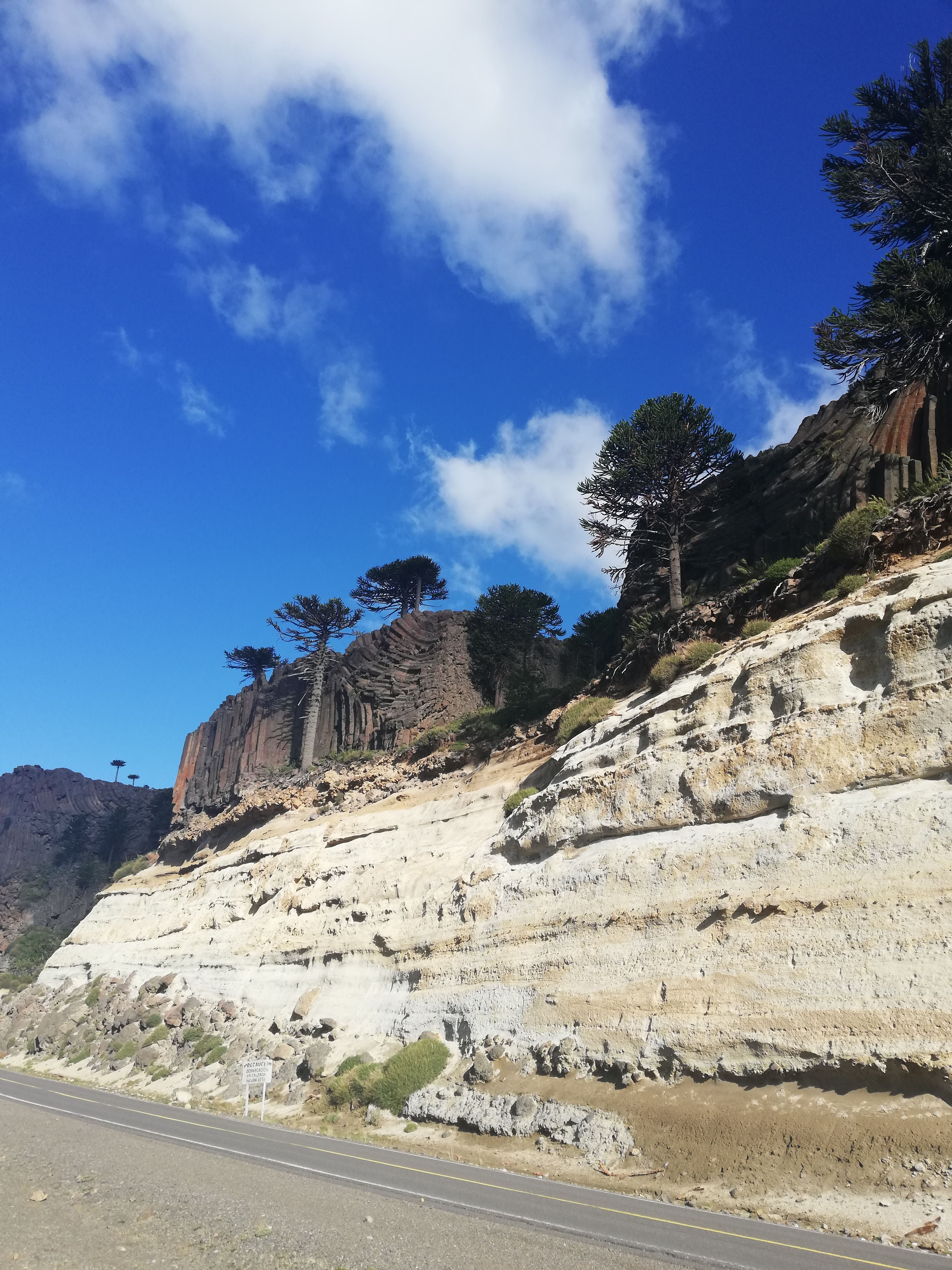 Ruta Nacional 242 in Argentinien mit Basaltsäulen und chilenischer Araukarie. Die Straße führt zum Paso de Pino Hachado.